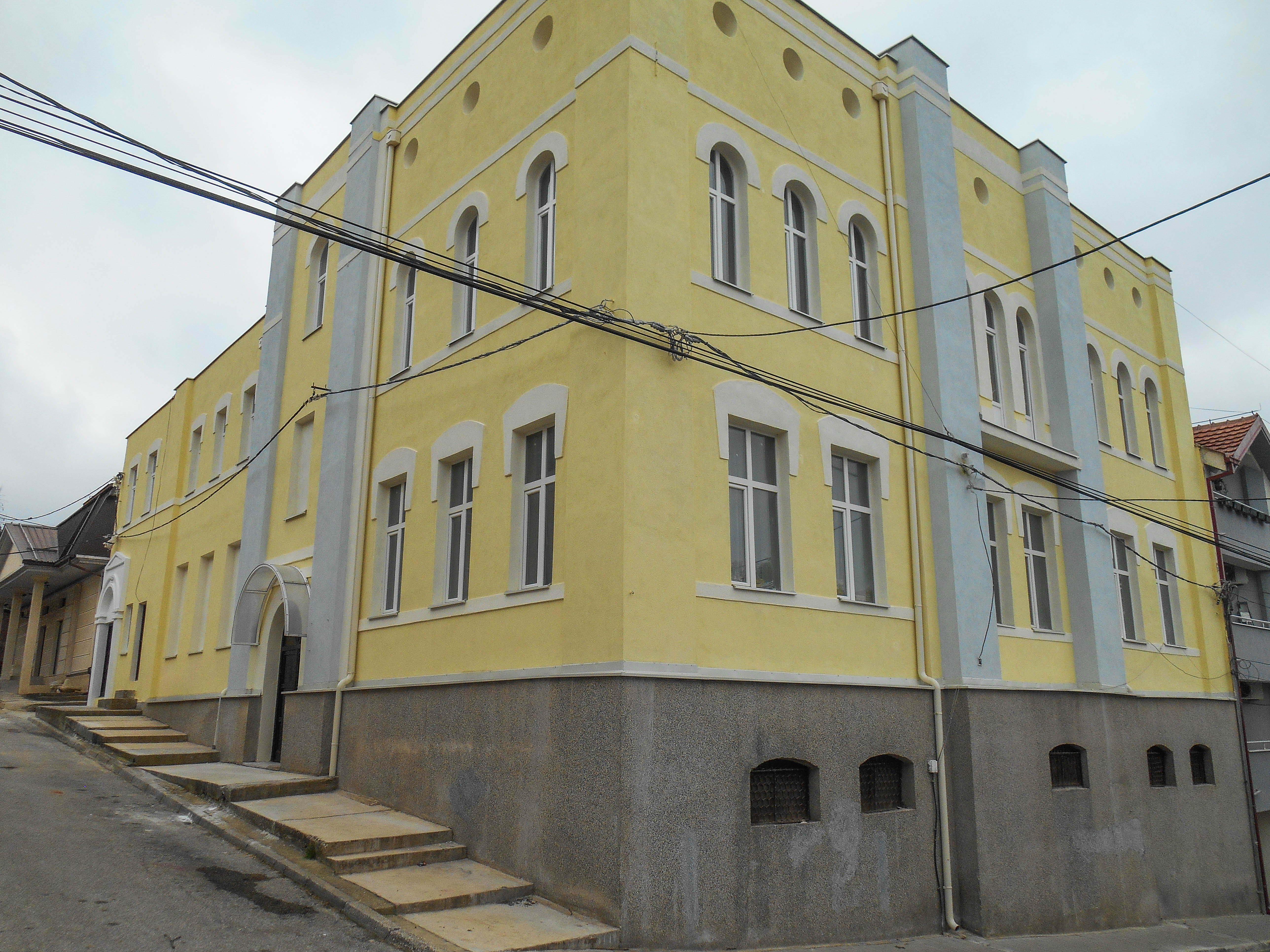 Завод за заштита на спомениците и Музеј - Струмица